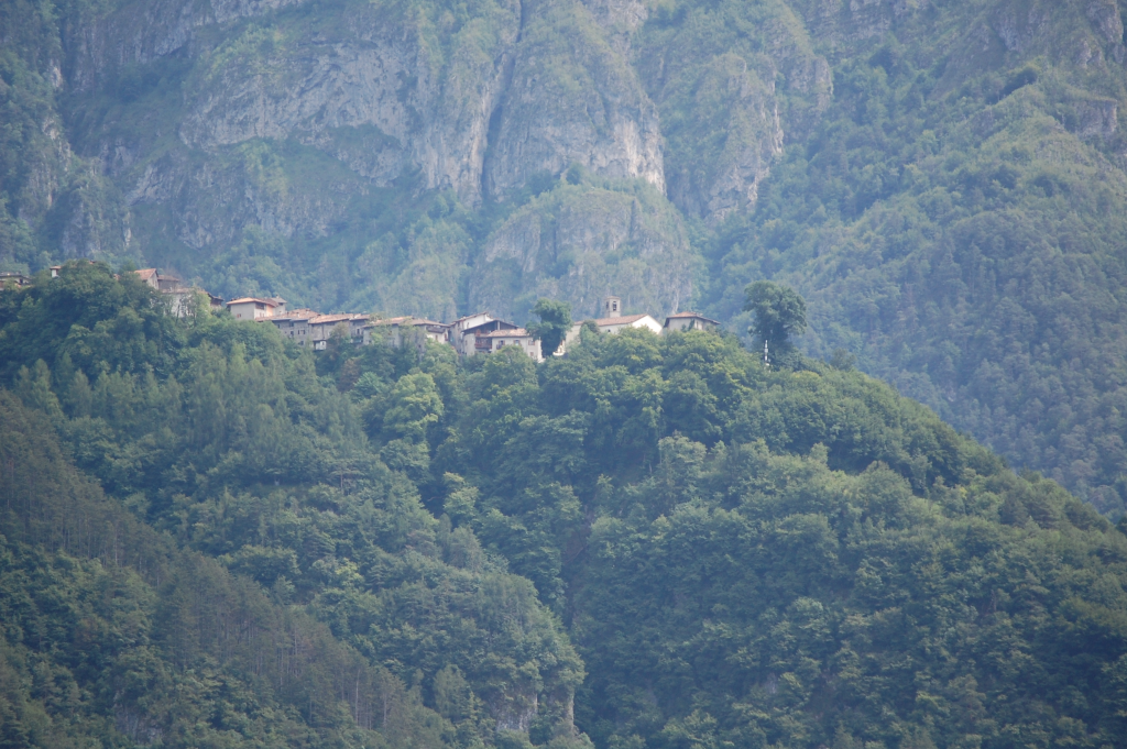 Bondone (TN)